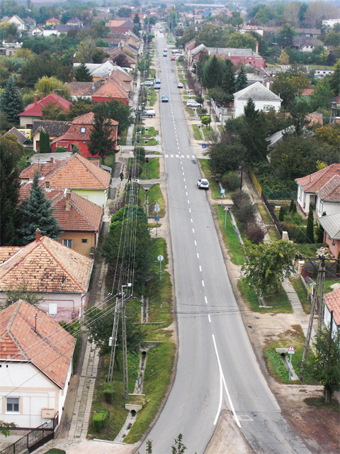 Pusztaszabolcs, Adonyi út a templomtoronyból